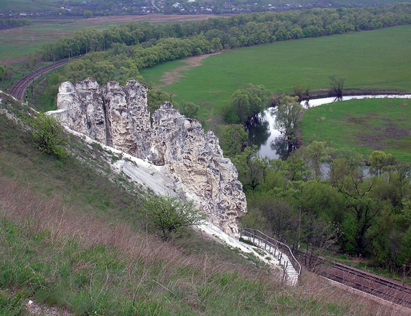 Дивногорье. Вид от храма